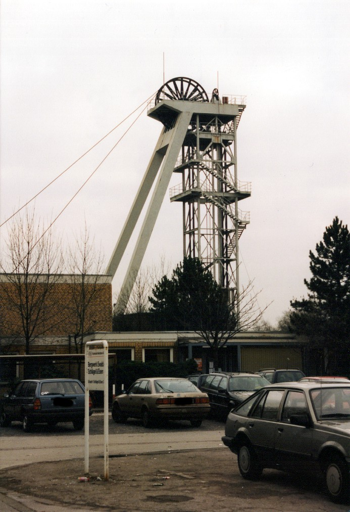 Schacht "Schlägel & Eisen 2" in 1997 (Scan)